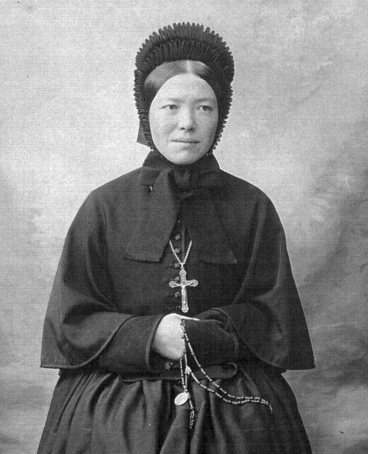 Rosa Splingaerd en habit des religieuses des Dames Auxiliatrices des Ames du Purgatoire